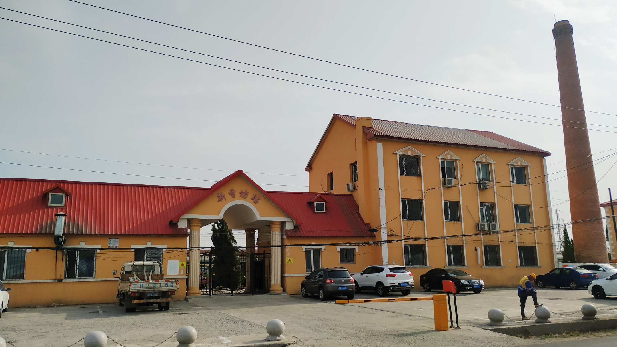 中文（中国大陆）: 新香坊站 滨绥铁路